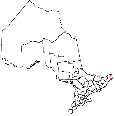 Volapük: Topam in provin: Ontario.